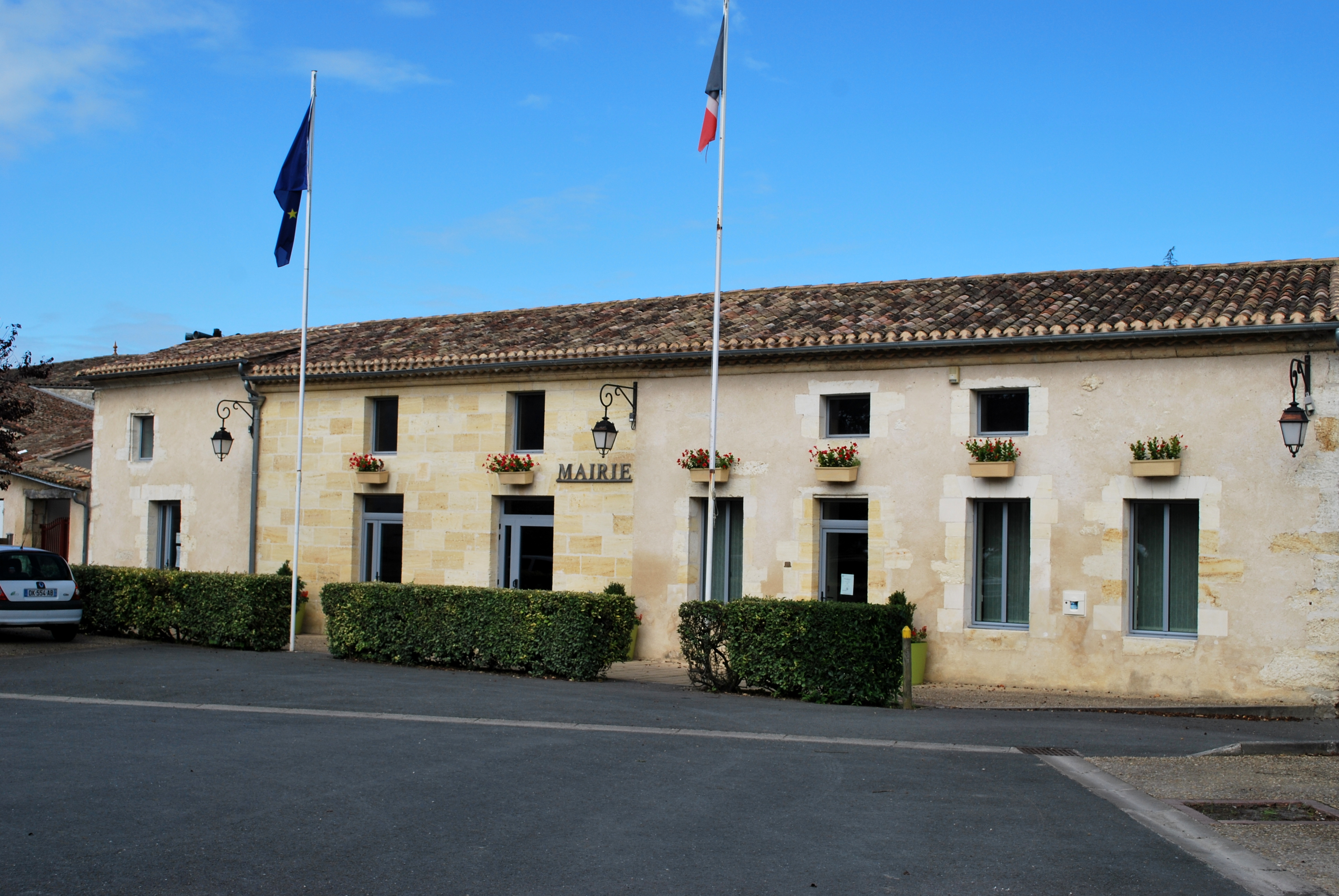 Saint-Romain-la-Virvée